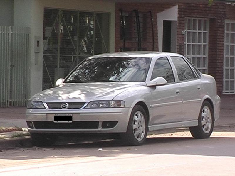 Chevrolet Vectra de segunda Generación Argentina